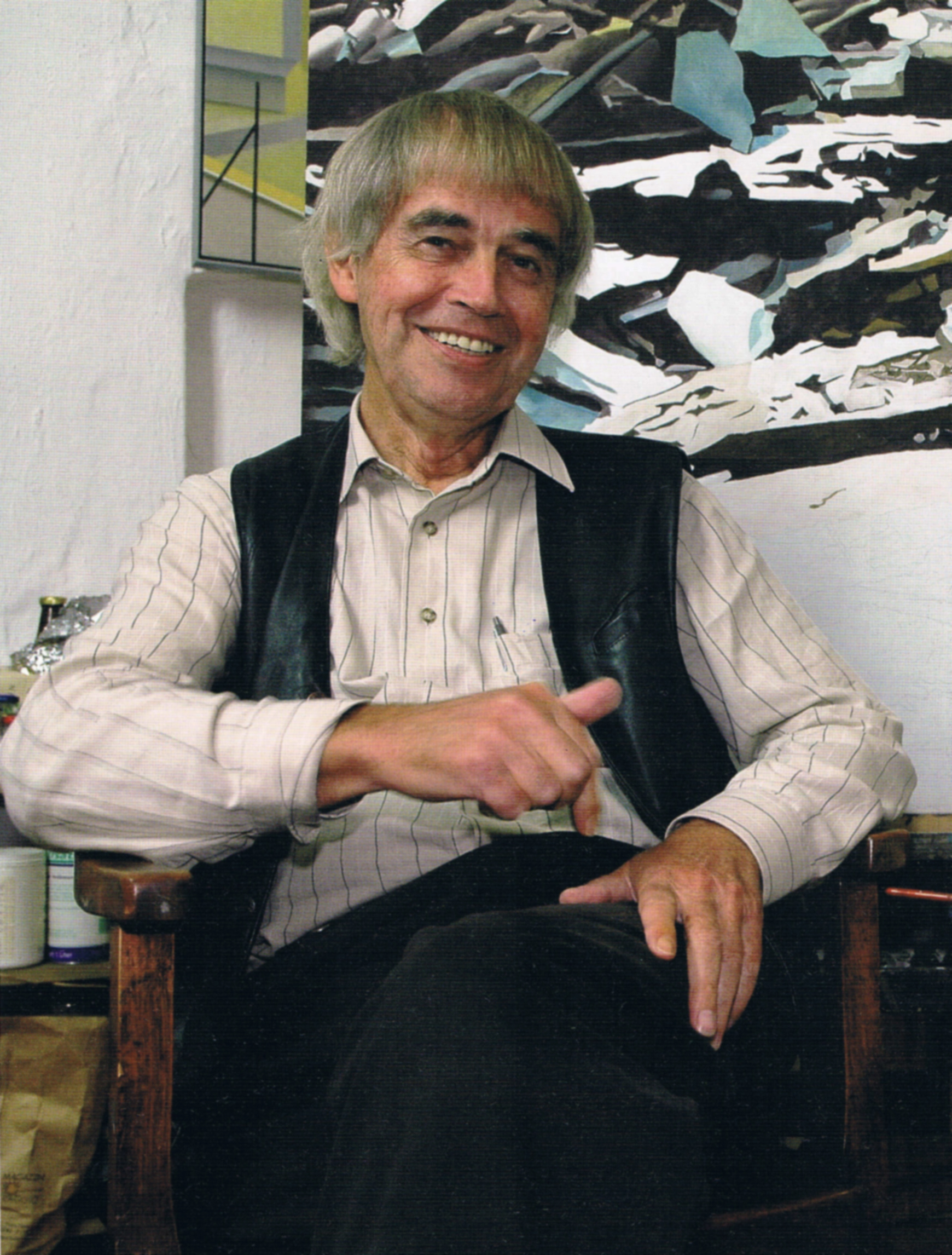 Portrait des Malers, Grafikers und Dichters Wilhelm Beuermann ...